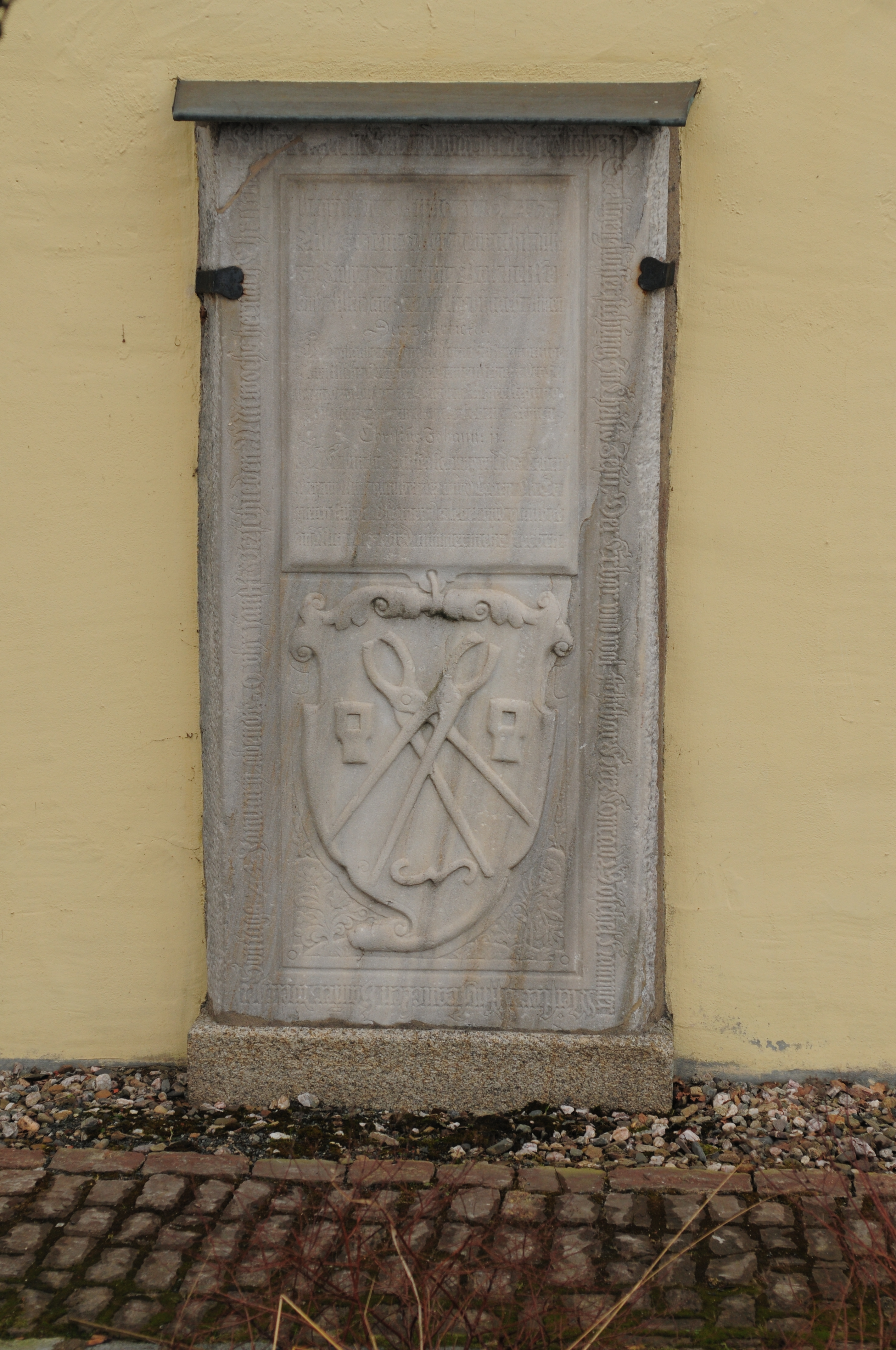 Weißenstadt, Epitaph an der Außenfassade der Gottesackerkirche/Friedhofskirche (Bayern, Deutschland)